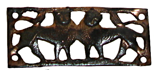 Applique décorative en bronze doré et ajouré avec des décors zoomorphes, fin du XIIe siècle et début du XIIIe siècle, découvert à Château Lastours en Aude en France